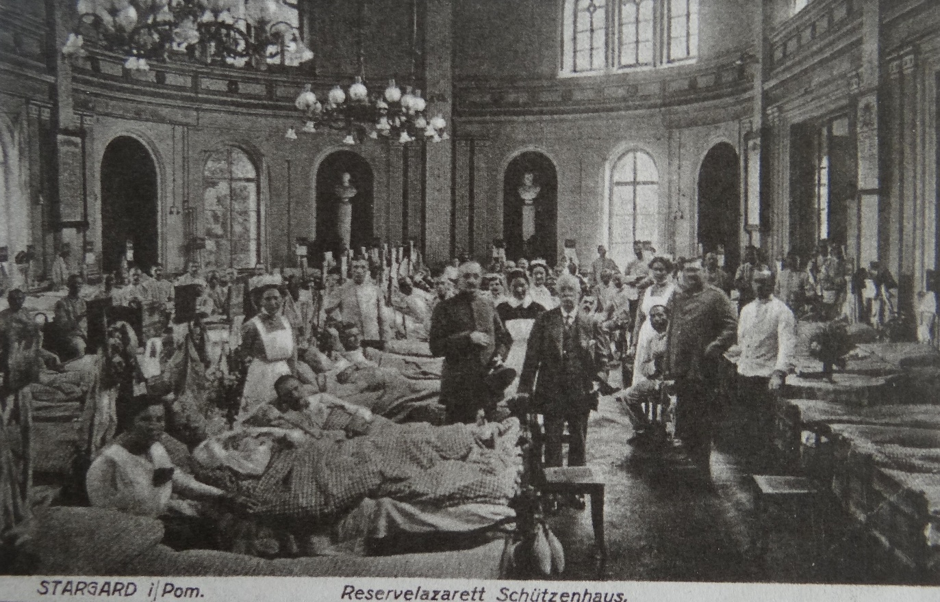 Stargard i.P., 1916 r. Lazaret rezerwowy w domu Bractwa Kurkowego